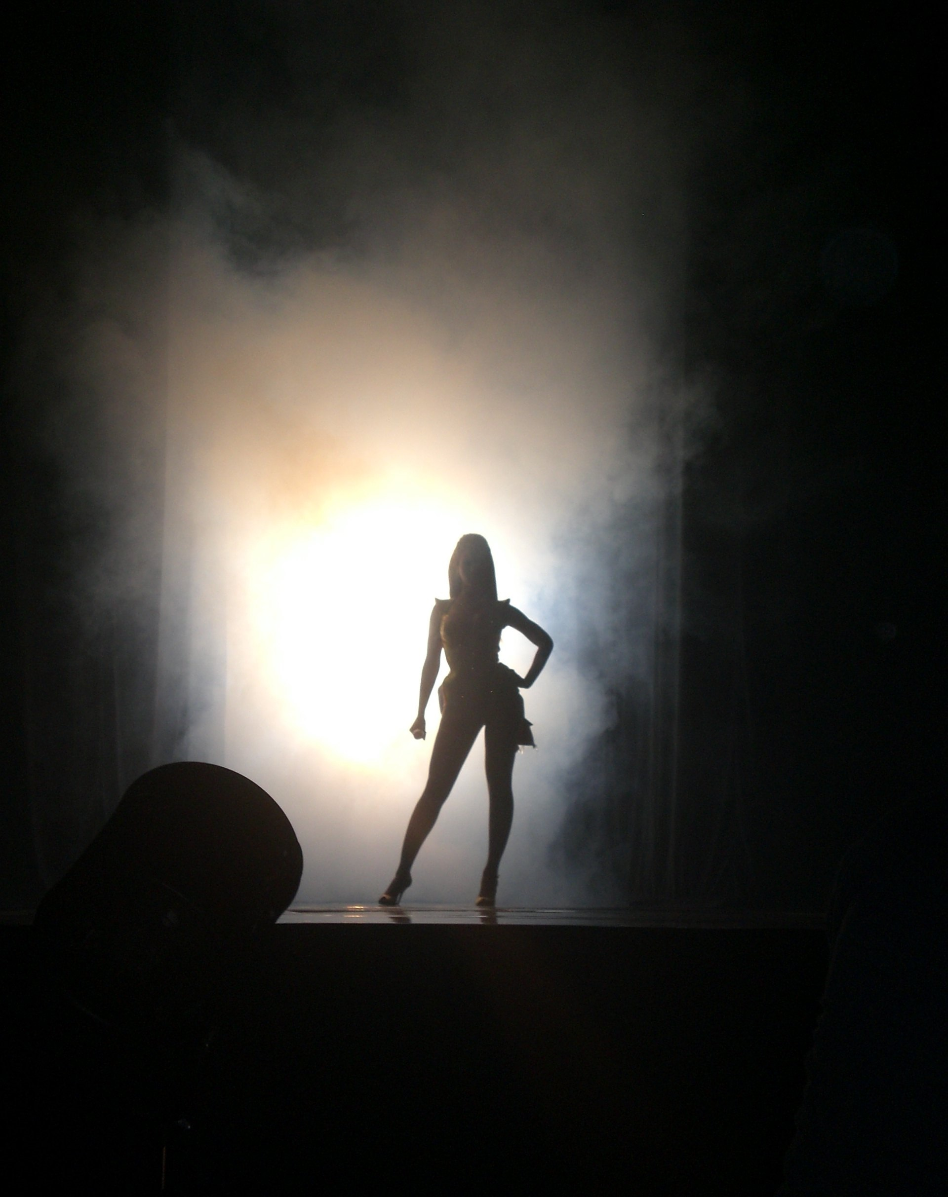 Beyonce durante el I am... Tour en Edmonton Canada